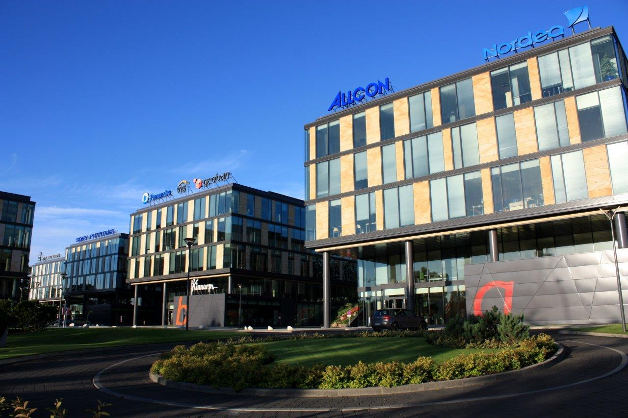 Gdynia, ul. Łużycka 6 - Siedziba ALLCON, Łużycka Office Park